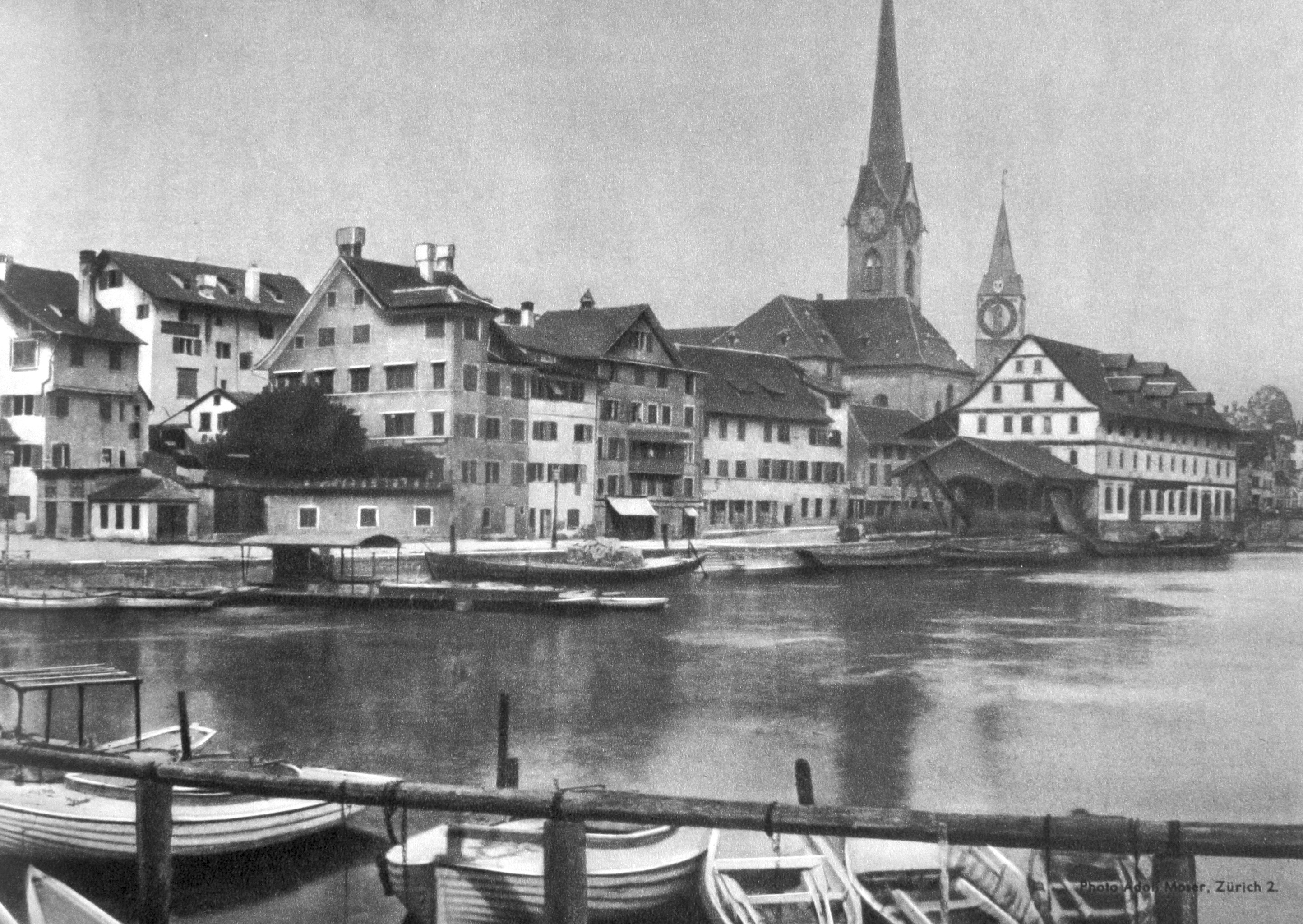 Kratzquartier um 1880 von Südosten, rechts das Kornhaus